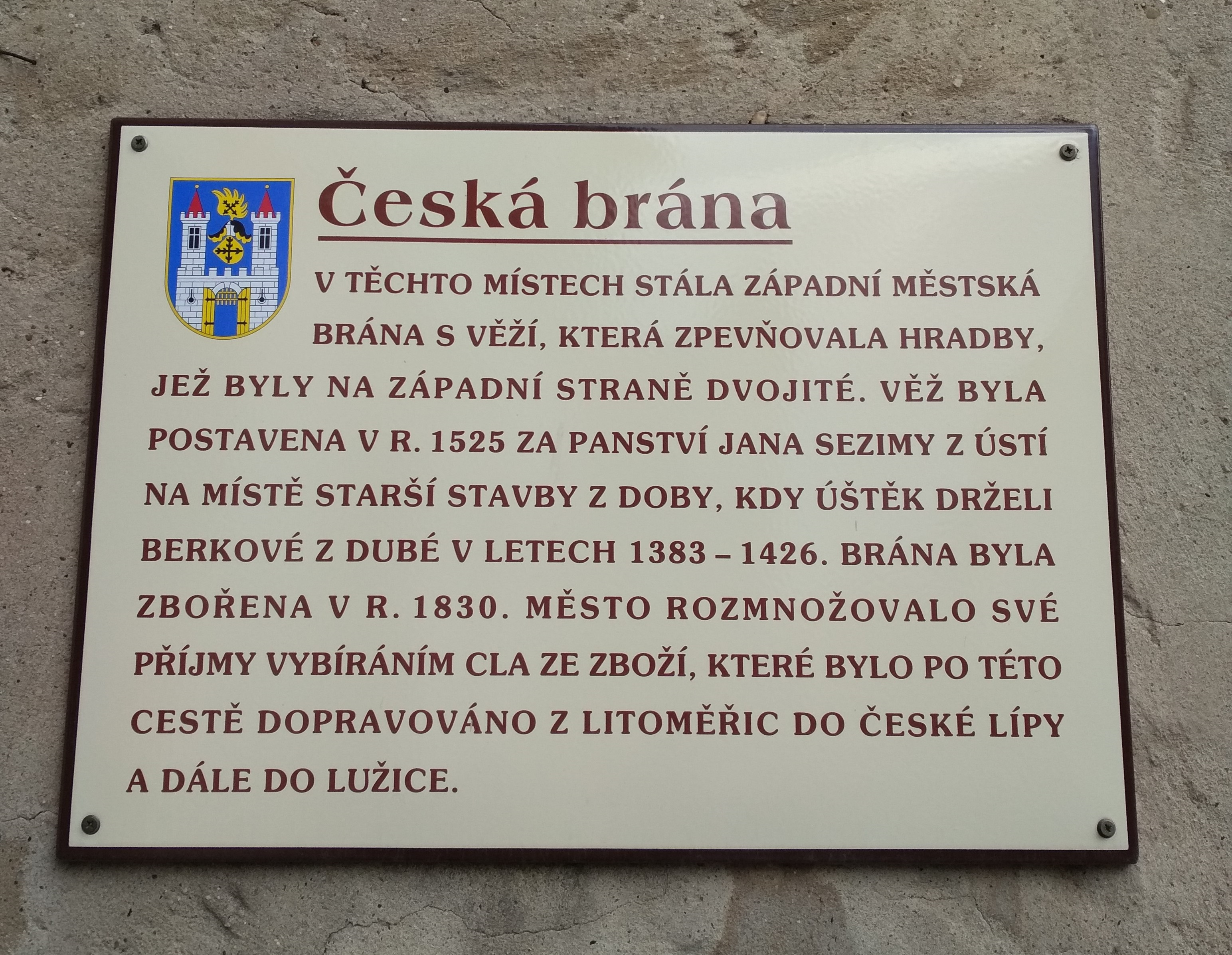 Západní brána v Úštěku, tabulka